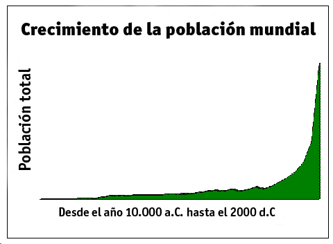 Gráfica donde se muestra el crecimiento de la población mundial. Castellanizado a partir de Image:Population curve.png